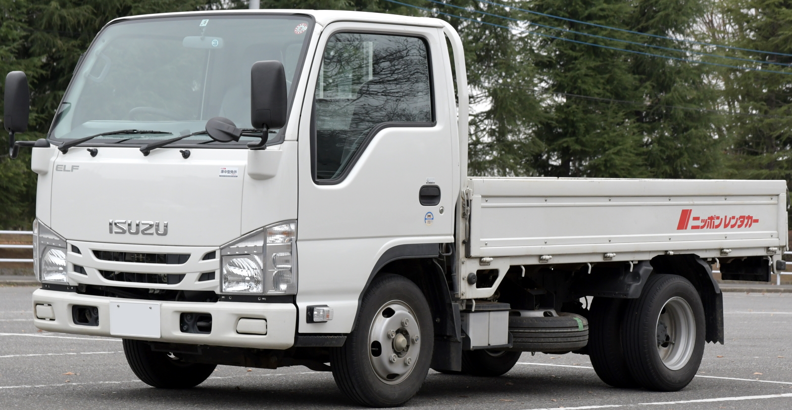 ニッポンレンタカーのエルフ2t標準キャブ・標準平ボディ・フルフラットロー（TPG-NJR85A）